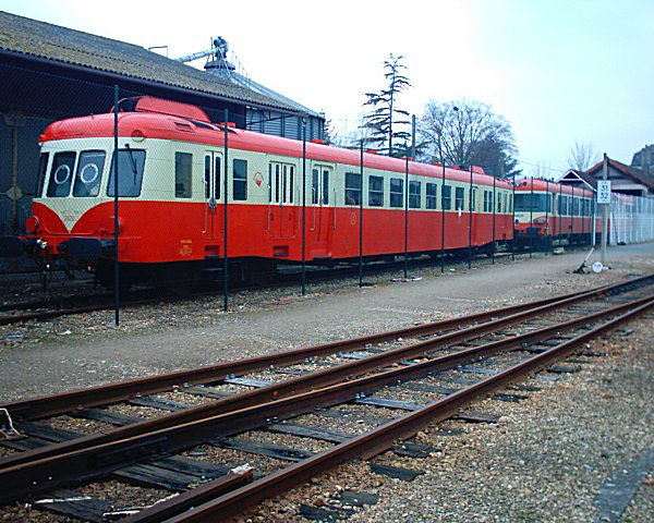 SNCF X 2426 at Pont-Audemer Station, Pont-Audemer.